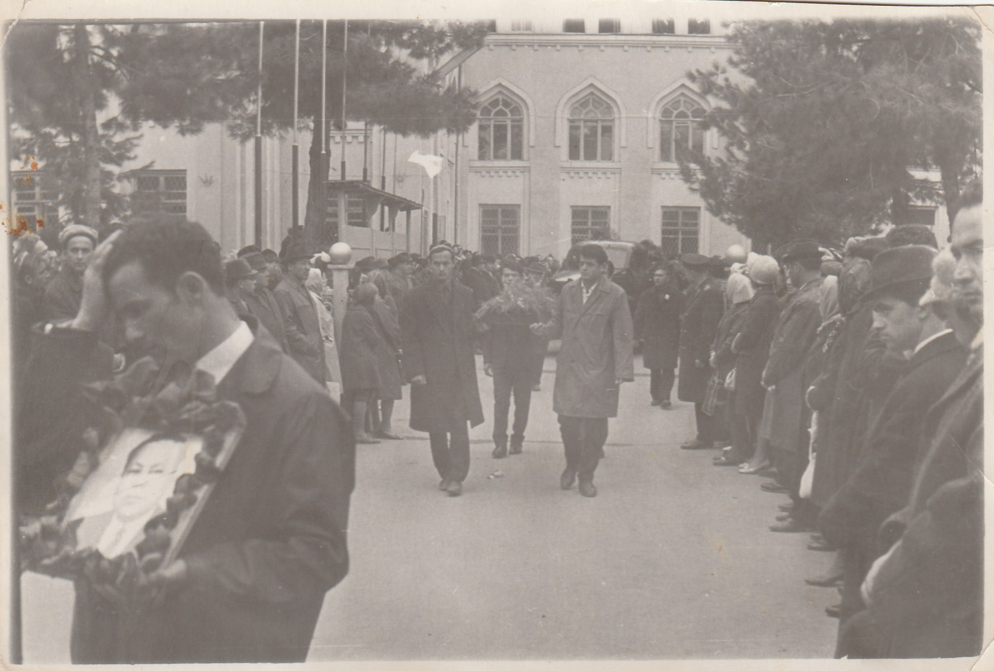 Oʻzbekcha/ўзбекча: Bogoutdinov A.M.ning dafn etish marosimidan , 1970-yil